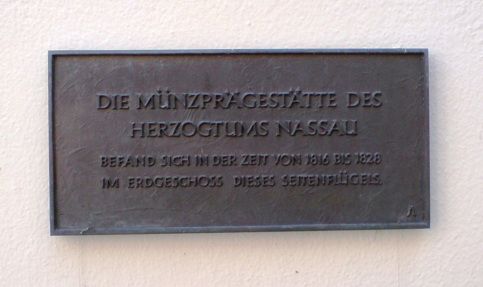 Hinweisschild zur Münzprägung am Seitenflügel des Bischöflichen Ordinariat Limburg